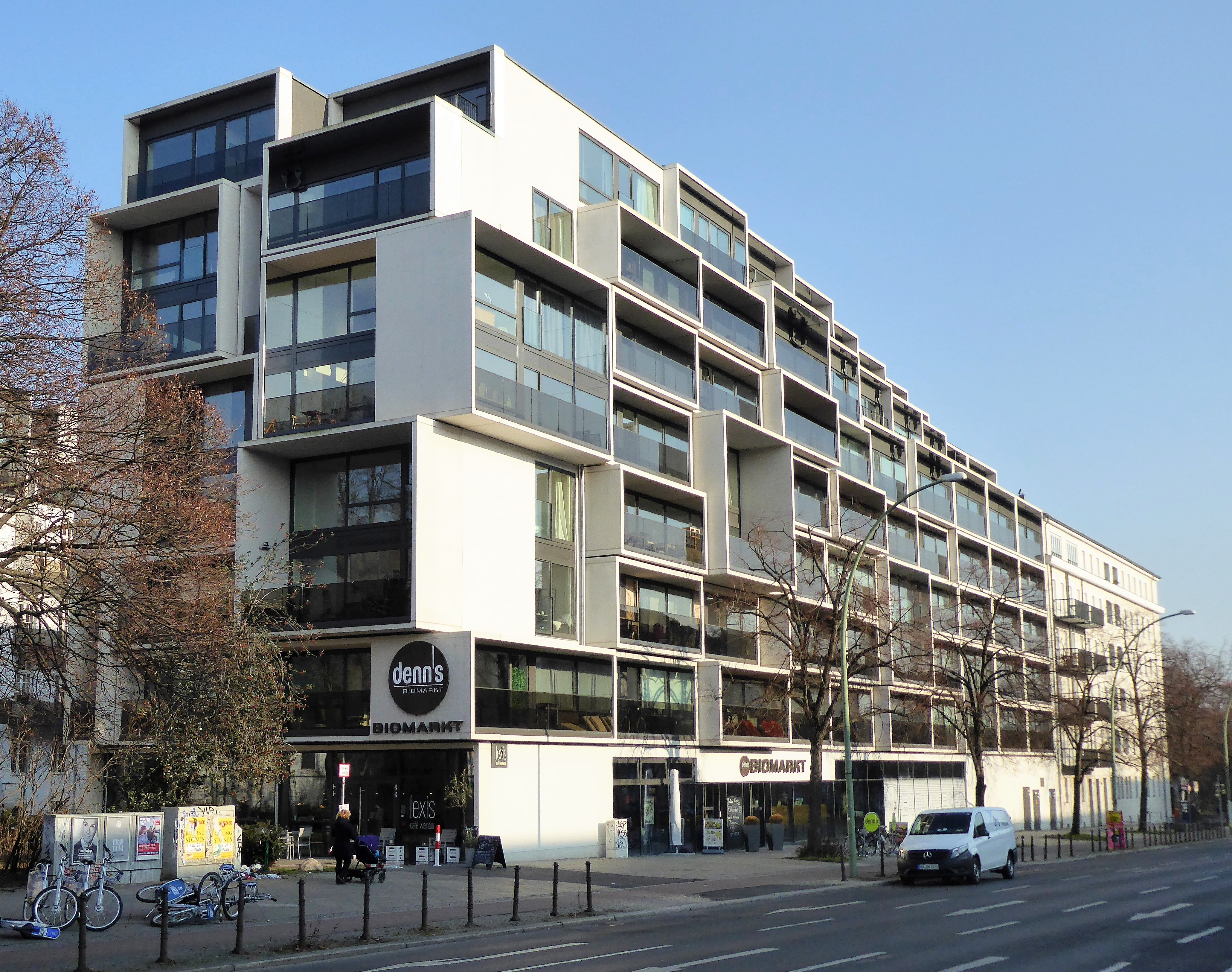 Prenzlauer Berg Danziger Straße 73 Paragon Apartments von GRAFT Architekten